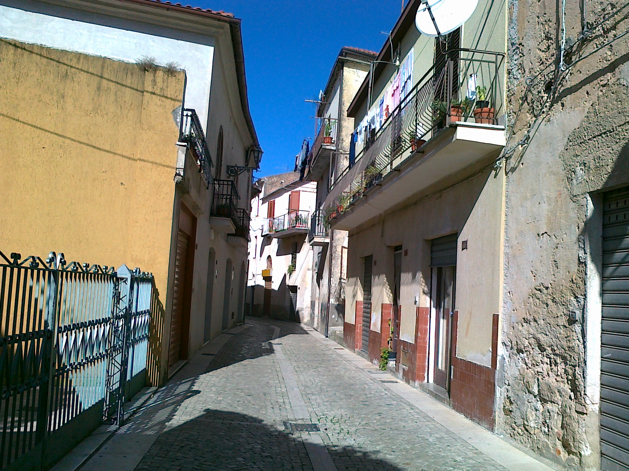 Particolare del centro storico